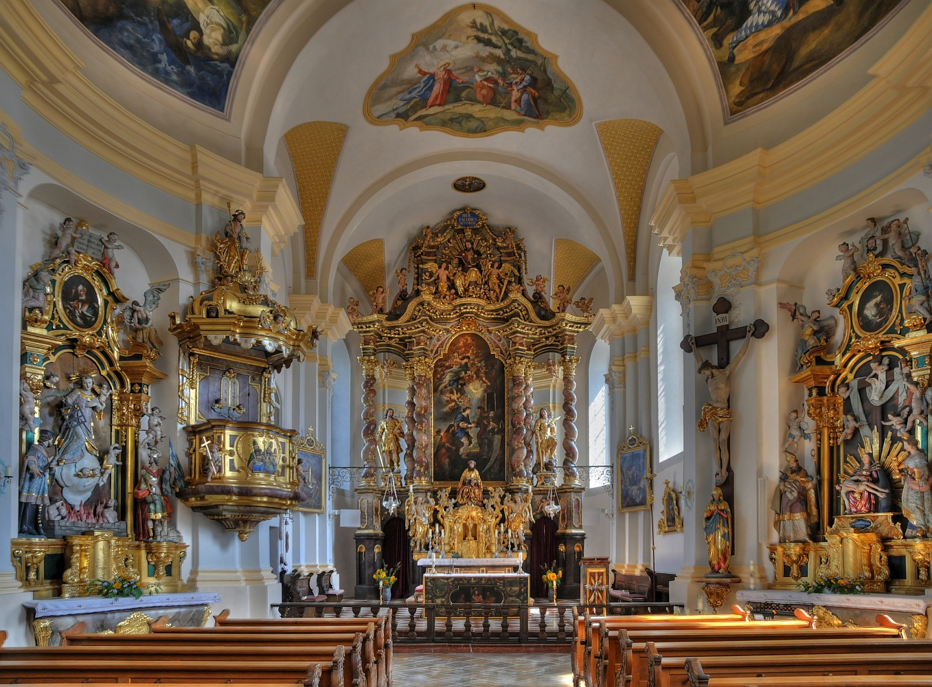 Innenaufnahme Kirche von Rohrdorf, Bayern, Deutschland